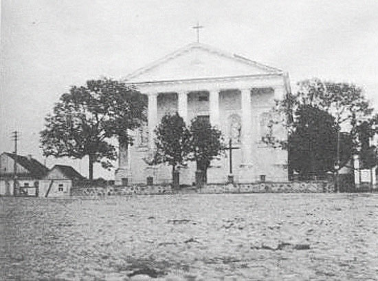 Беларуская (тарашкевіца): Валожын (Vałožyn), пляц Рынак (plac Rynak). Касьцёл Сьвятога Язэпа, званіца